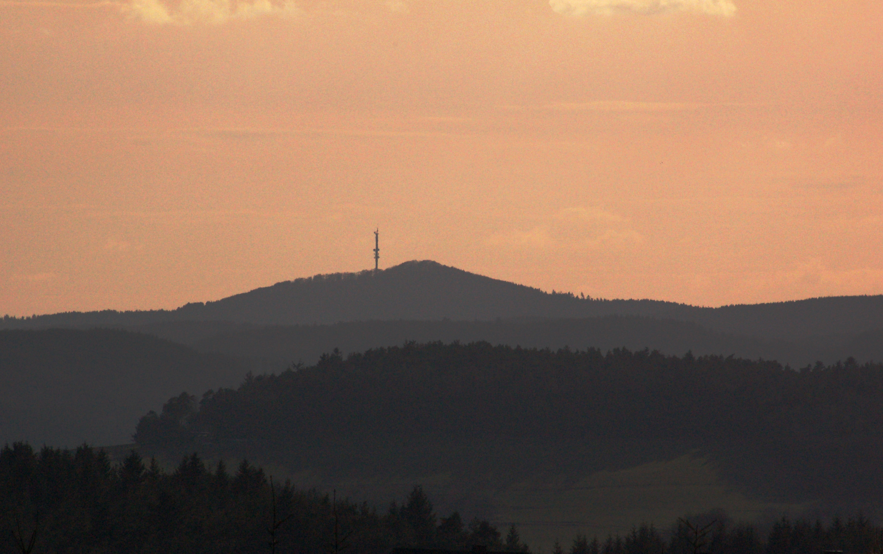 Hochkelberg im Sonnenuntergang vom Gänsehals aus betrachtet